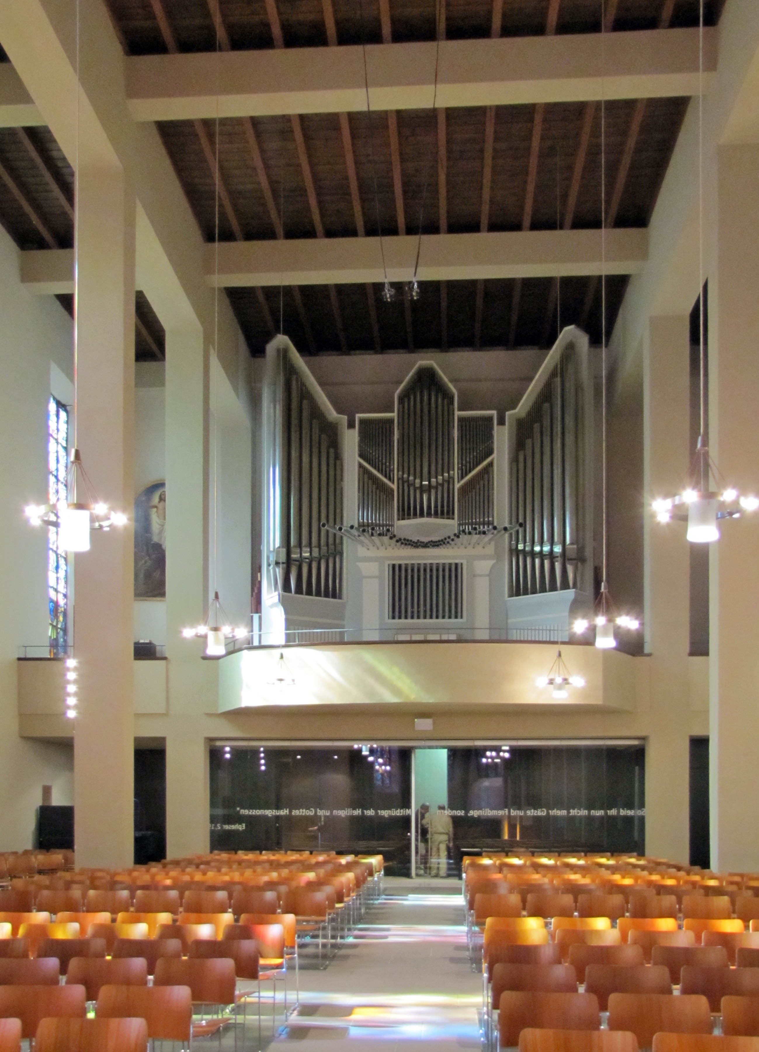 Innenraum der, zum Musik- und Veranstaltungsraum umgebauten, Heiliggeistkirche im Dominikanerkloster in Ffm.